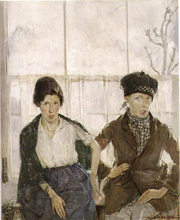 British Painter Madeline Green1884-1947)